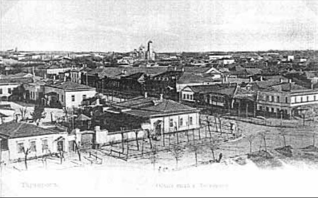 Вид Таганрога